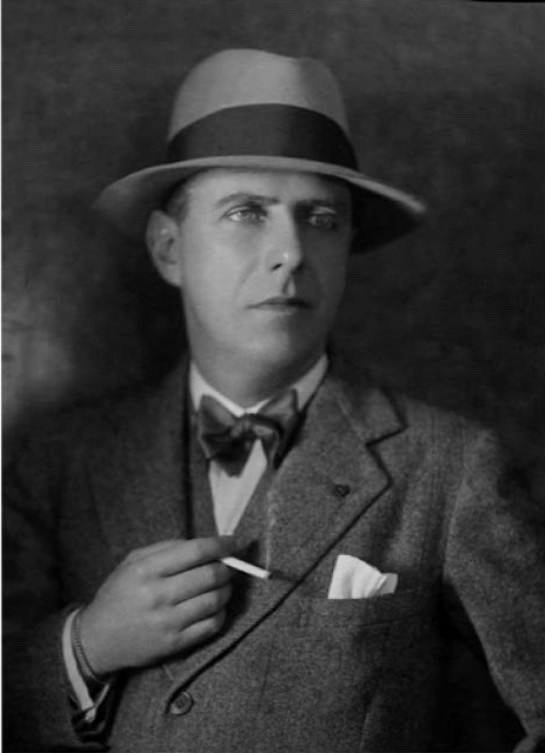 El diplomático chileno Carlos Morla Lynch